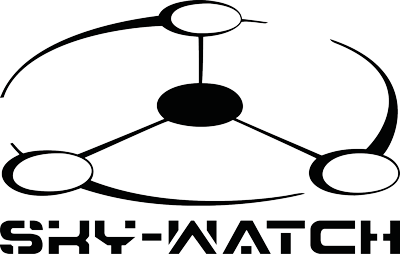 Sky-Watch logo